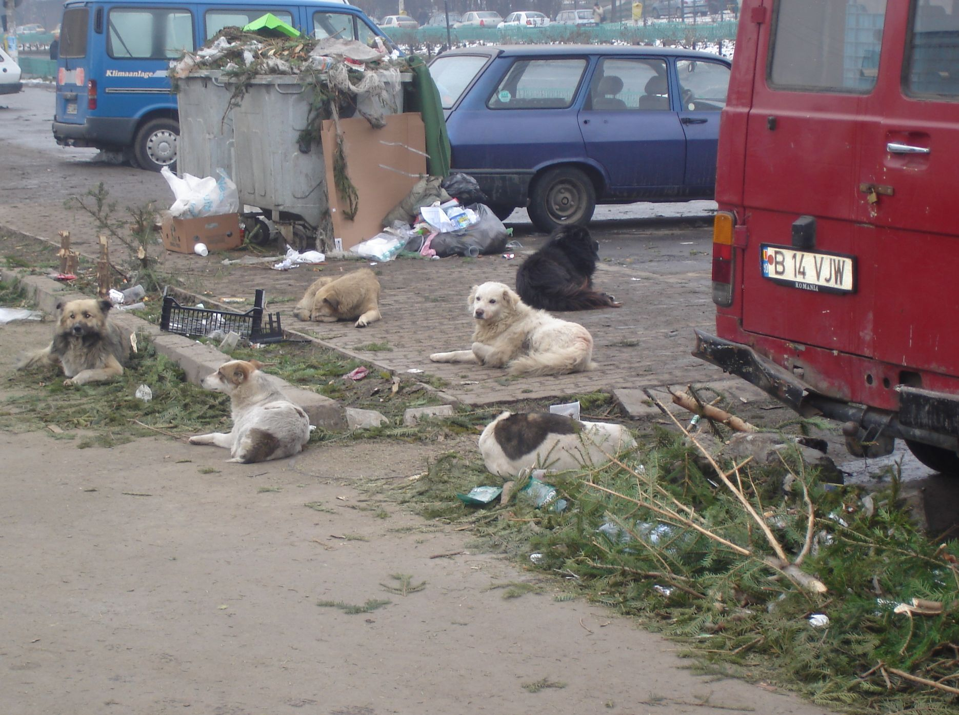 Haită de câini comunitari adăstând pe gunoaiele lăsate de comercinții de brazi de Crăciun în parcarea pieței Drumul Taberei (fostă Moghioroș) din București, 26 decembrie 2007